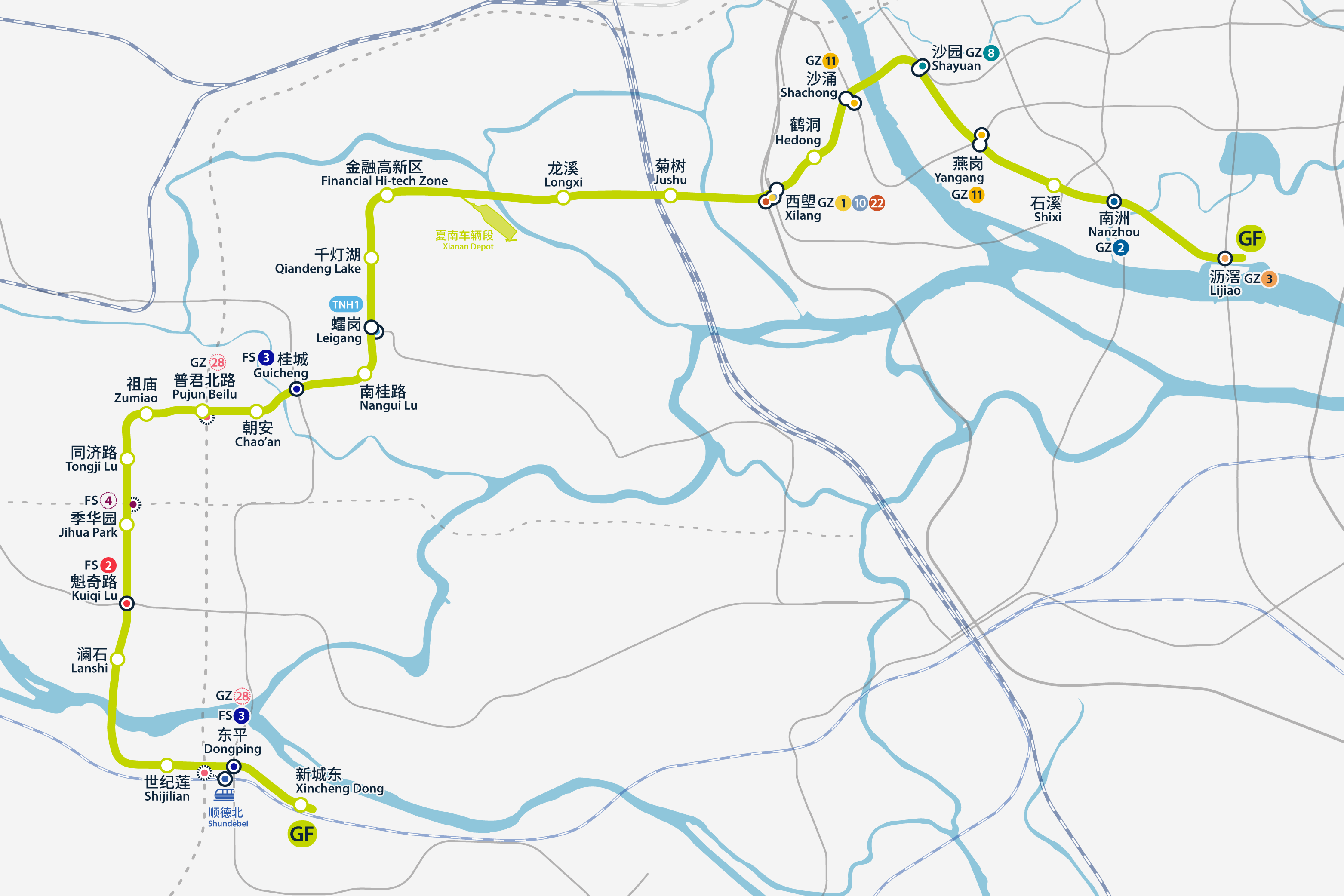 廣佛地鐵、廣佛地鐵後通段（西塱~瀝滘）及廣佛地鐵二期（魁奇路~小涌）路線圖，按真實走向比例繪畫